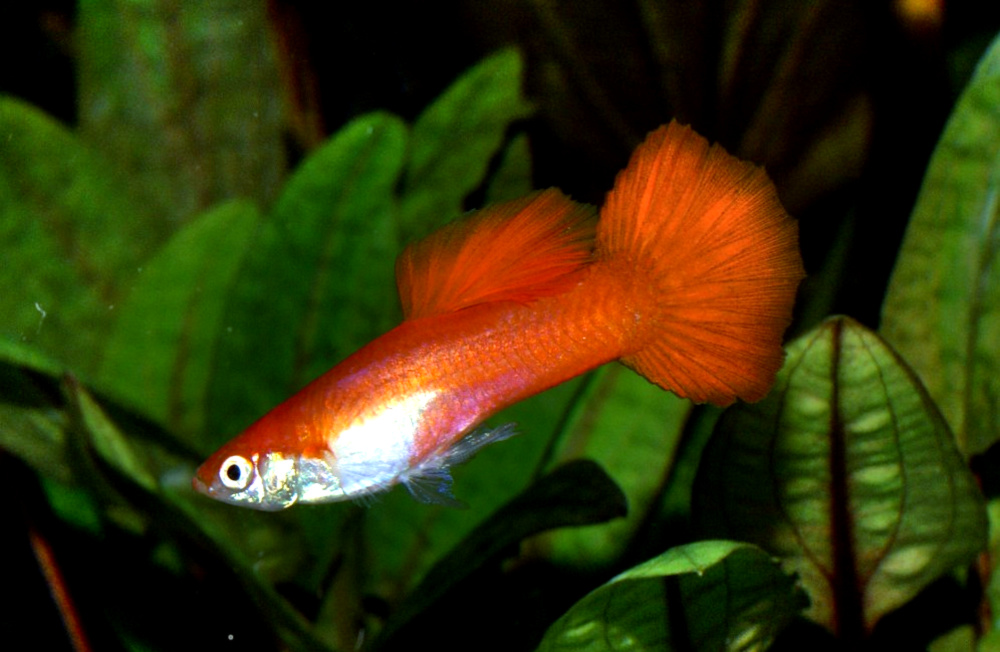 Guppy male